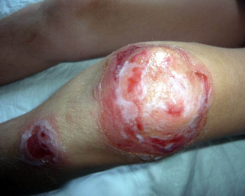 Impétigo bulleux (genoux) enfant 8 ans